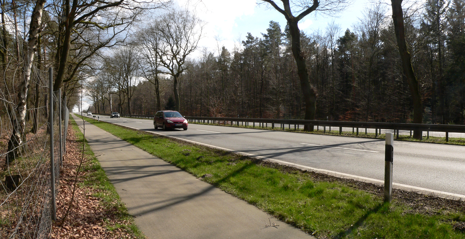 Bundesstrasse 6 im Grinderwald